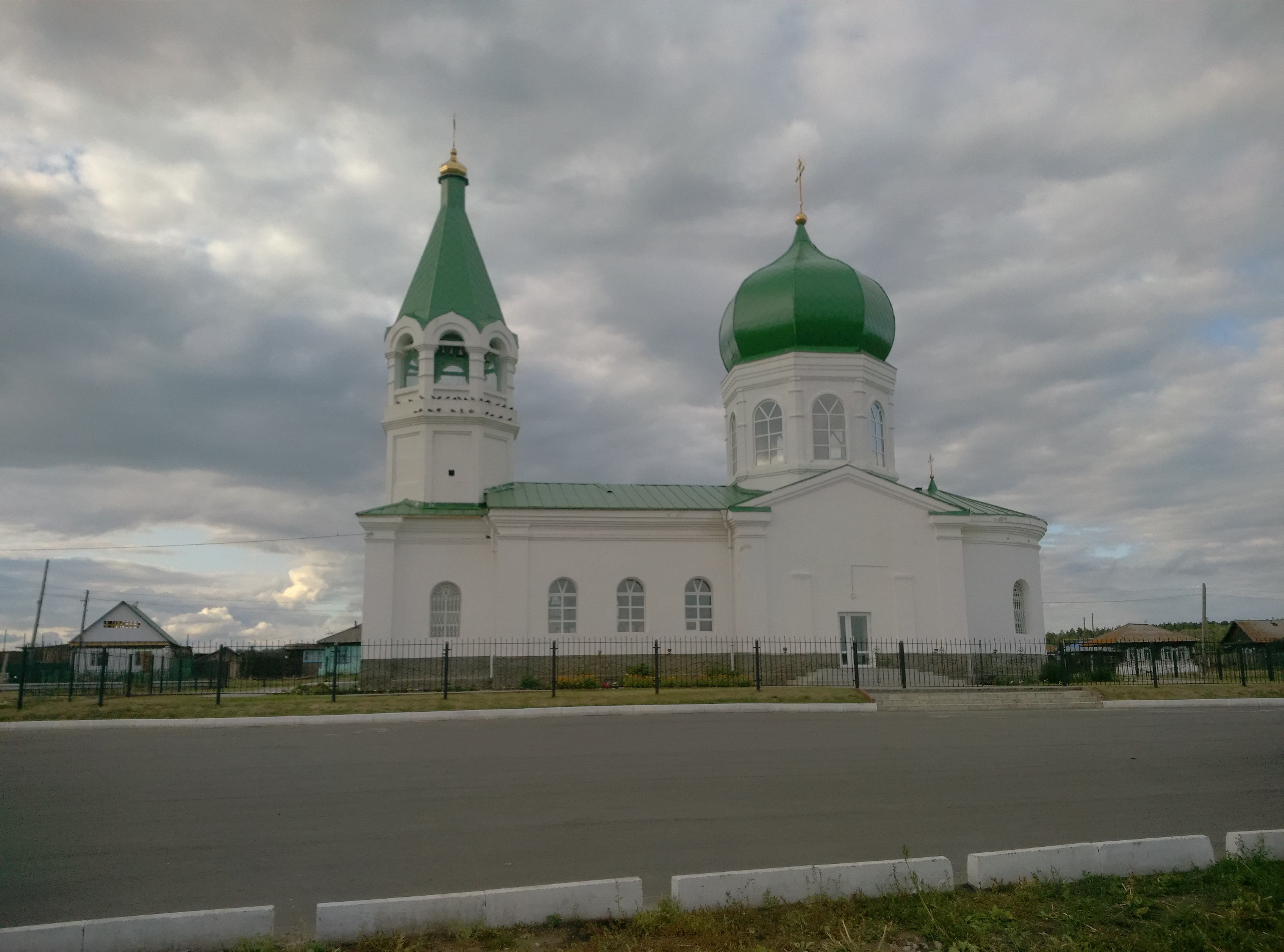 Храм Святого Благоверного князя Александра Невского